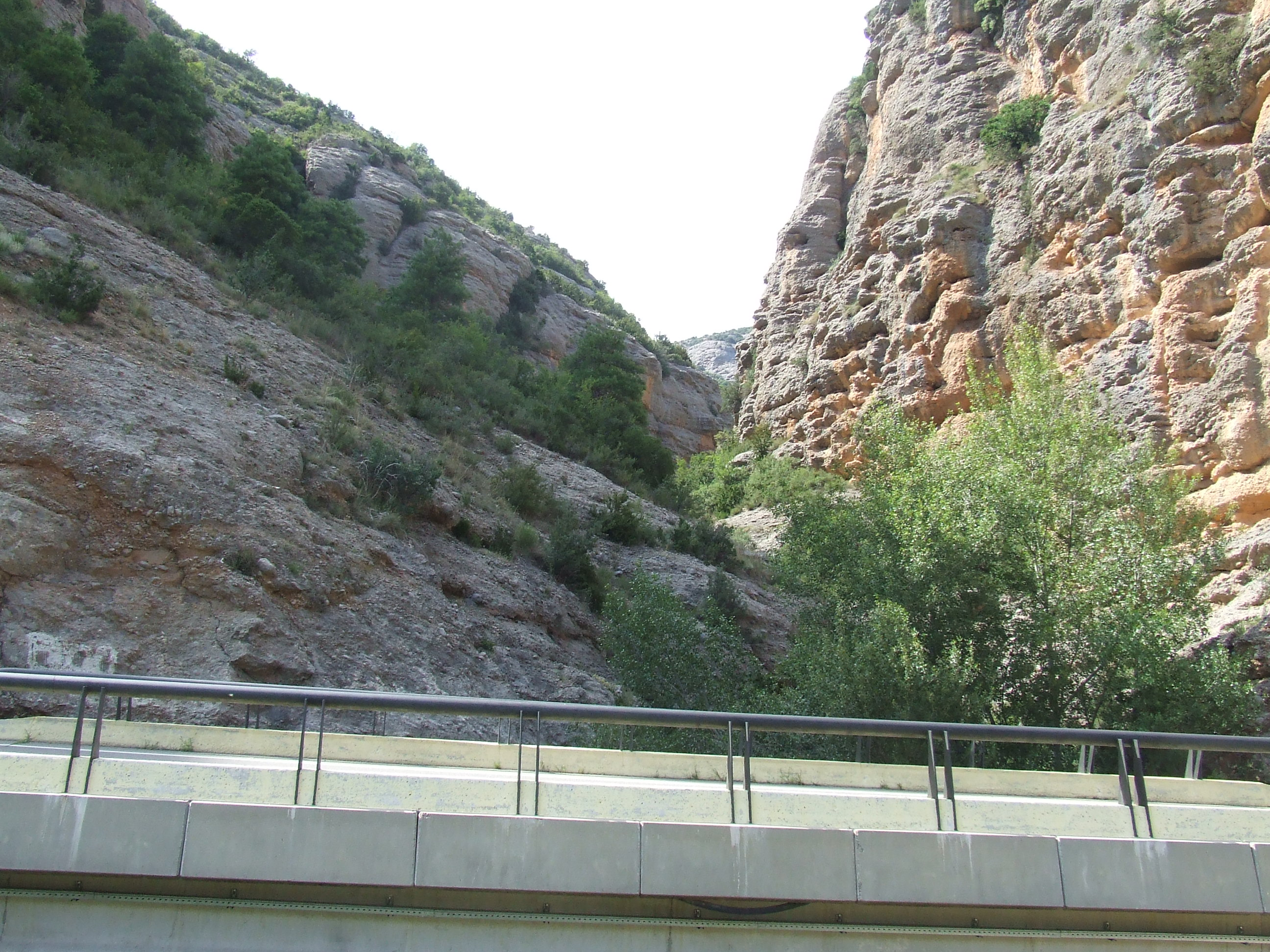 El barranc de Sant Pere prop de Collegats (Gramuntill, la Pobla de Segur, Pallars Jussà)